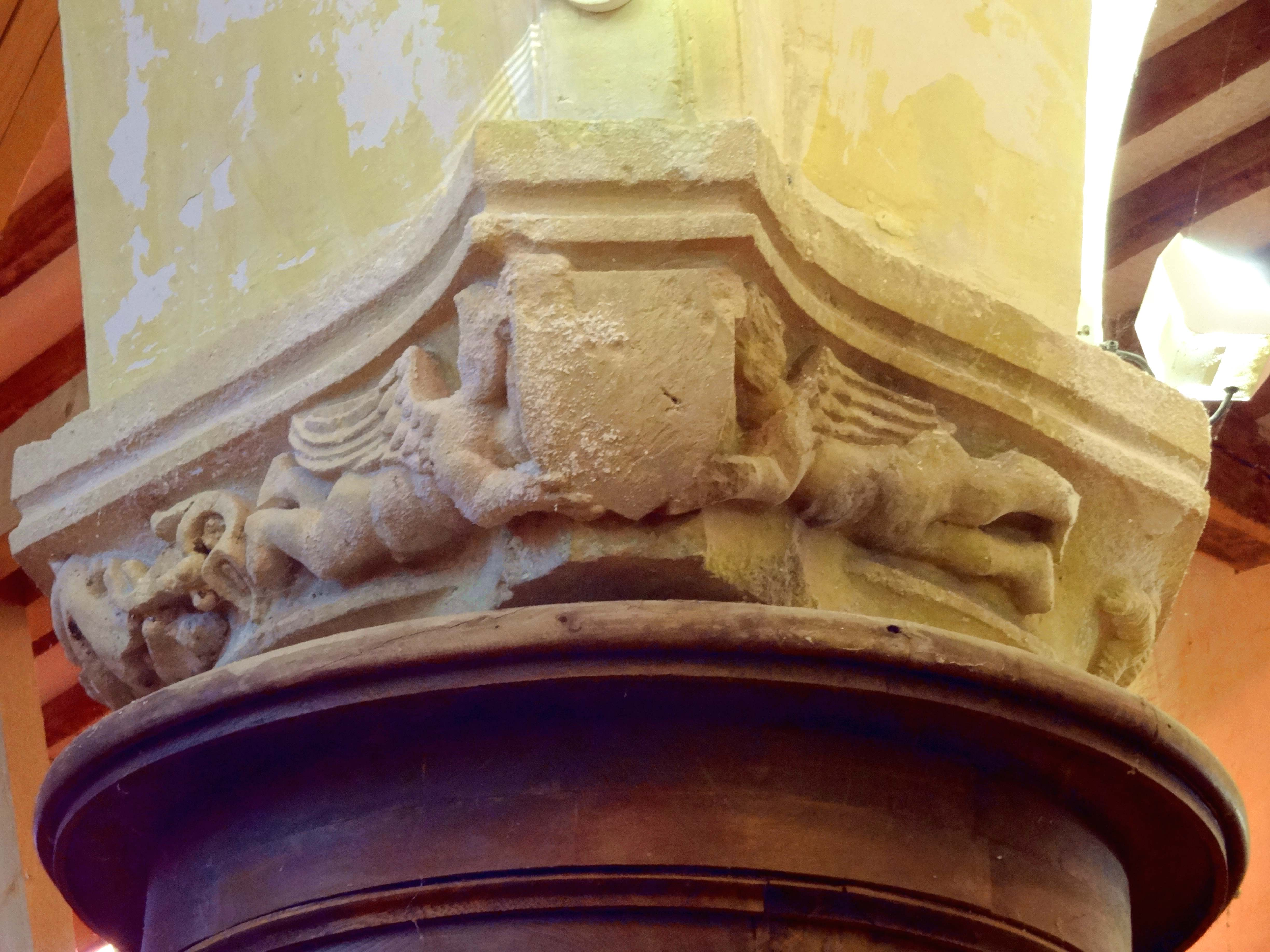 Chapiteau de l'église - voir titre.